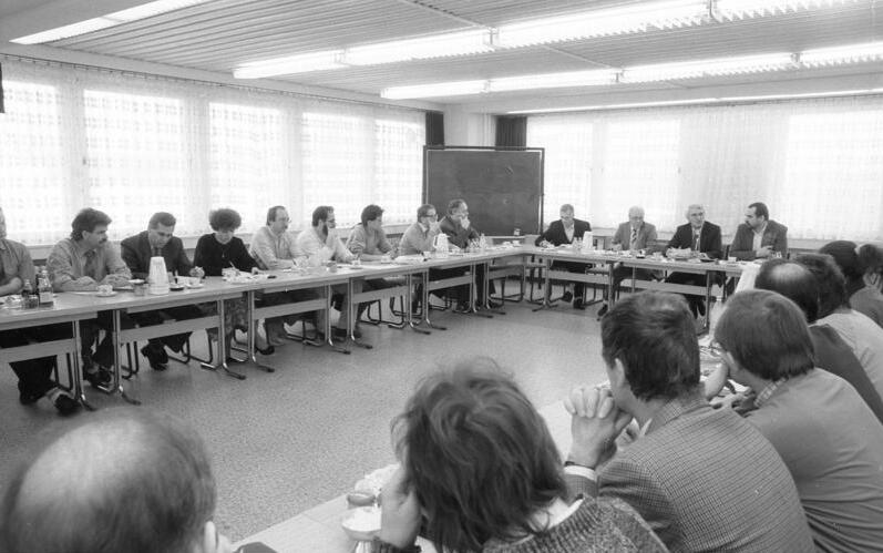 ADN-ZB/ Zimmermann/30.1.90 Berlin: 2. Runder Tisch im ADN/ Die Leiter von zentralen Medien und die Medienbeauftragten der neuen Parteien und Organisationen trafen im Haus des Allgemeinen Nachrichtendienstes zum 2. Runden Tisch zusammen. 2.v.r.: ADN-Generaldirektor Günter Pötschke [1.v.r. Mathias Würzberger, 3.v.r. Günter Hundro].